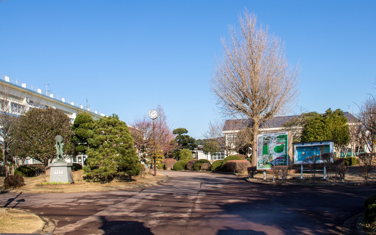 成田市立三里塚小学校